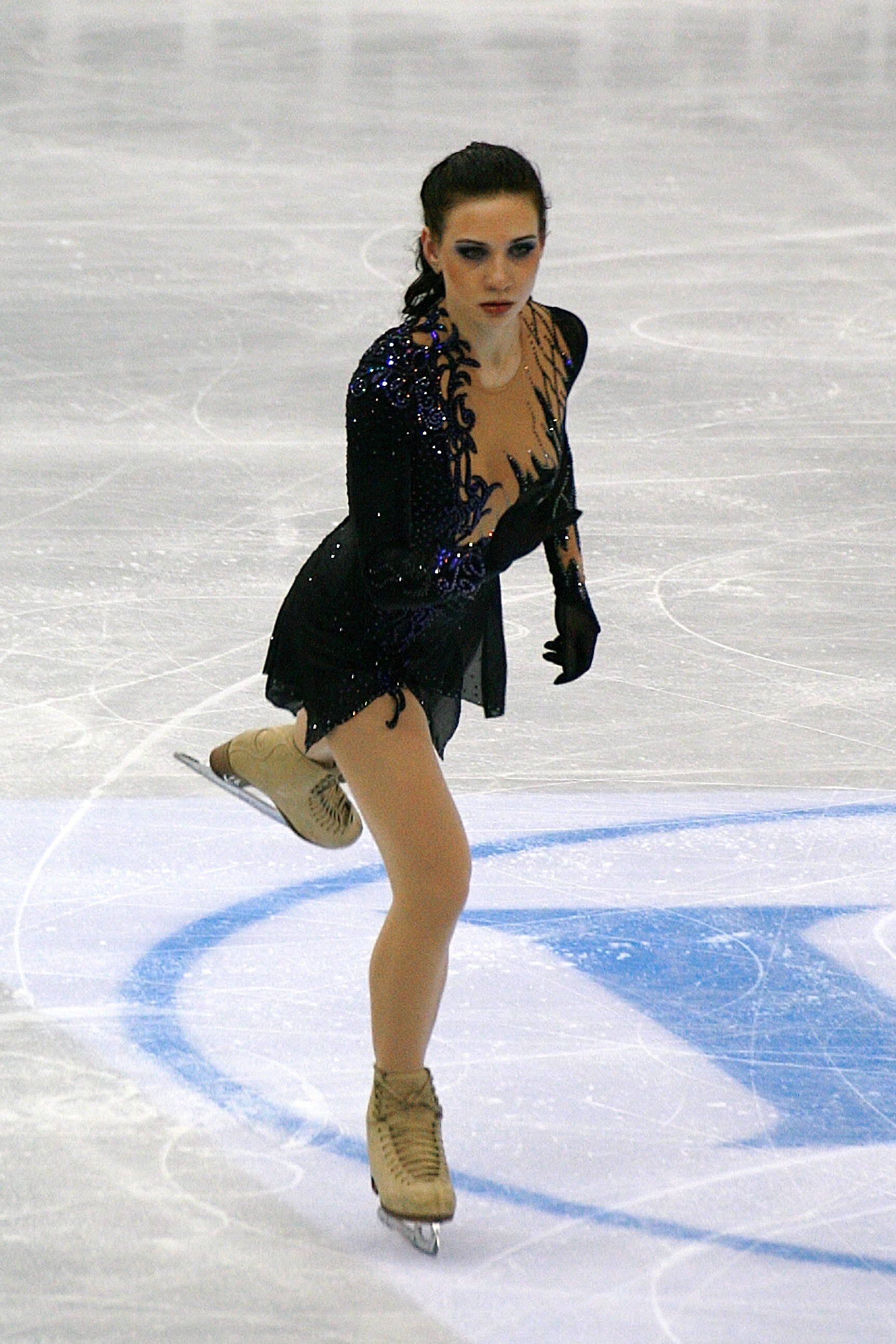 Алена Леонова (Россия) на чемпионате мира по фигурному катанию 2012